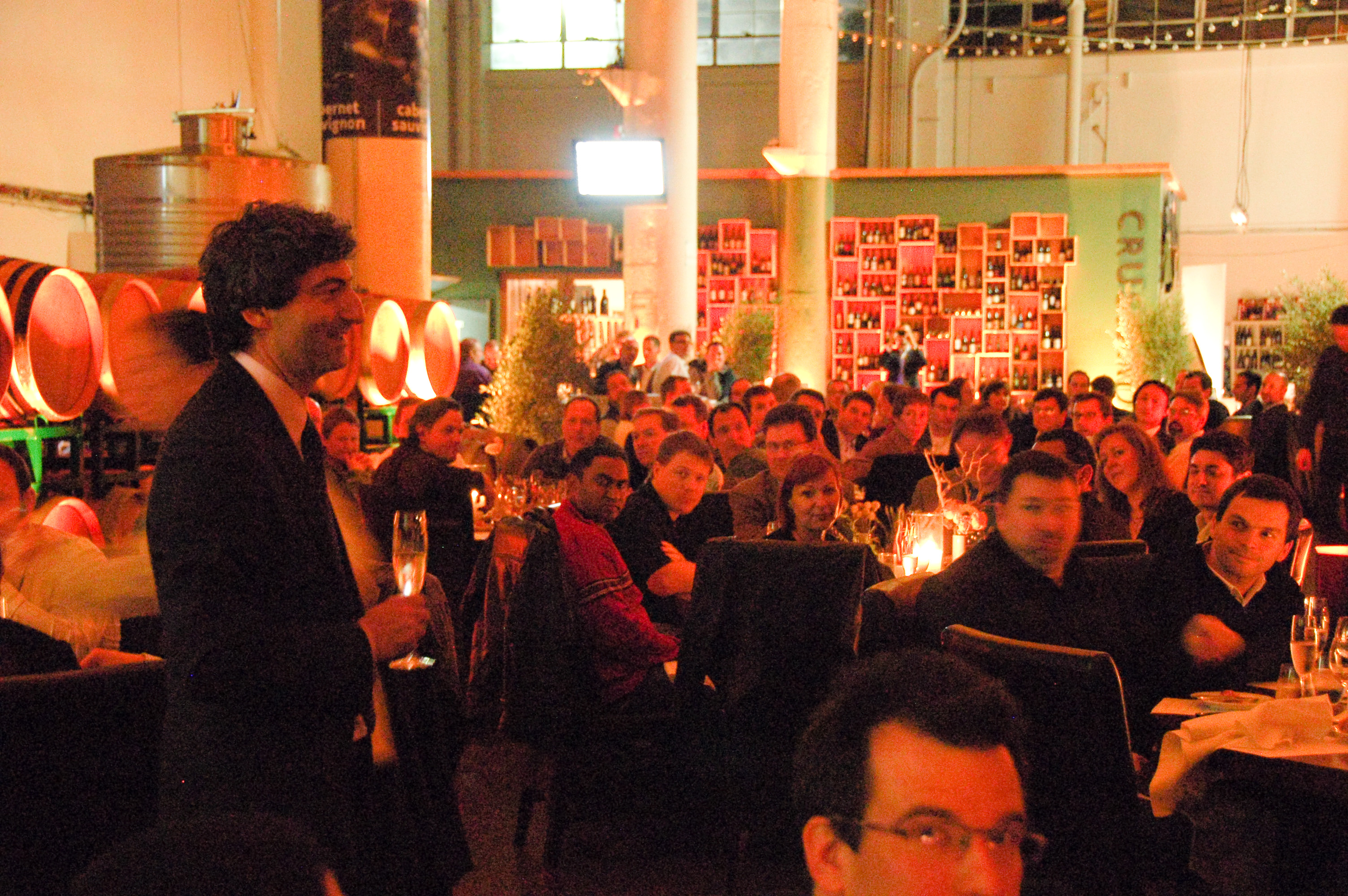 Réception chez Crushpad par Michael Brill